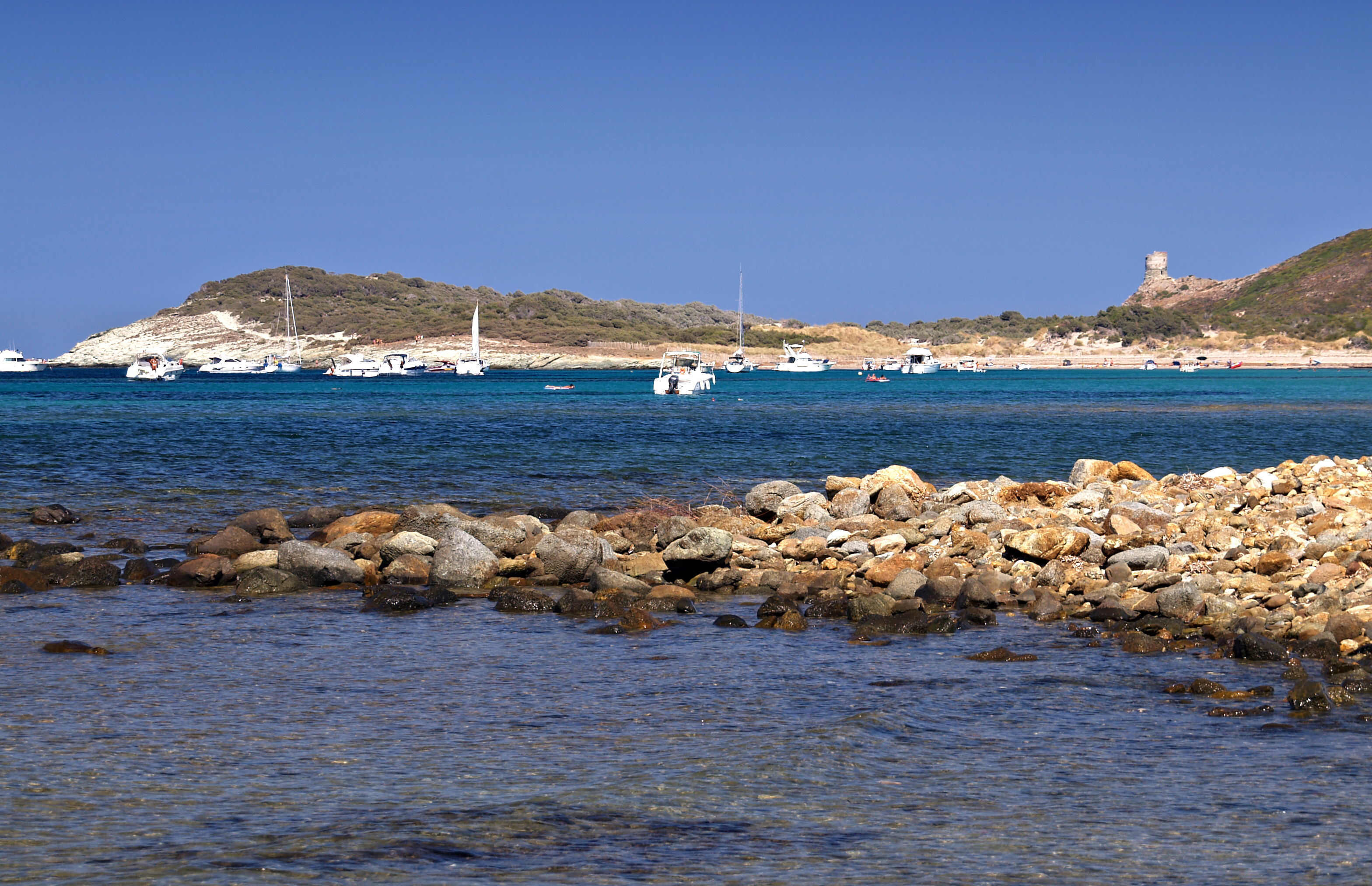 Rogliano (Corsica) - Tour d'Agnello et plage de Cala